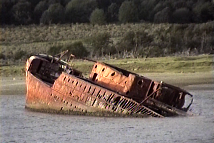 El vapor de carga y pasajeros "Monte Sarmiento" naufragado en las aguas del canal Beagle, frenta a la Estancia Remolino en el año 1912. Provincia de Tierra del Fuego, Antártida e Islas del Atlántico Sur, Argentina.